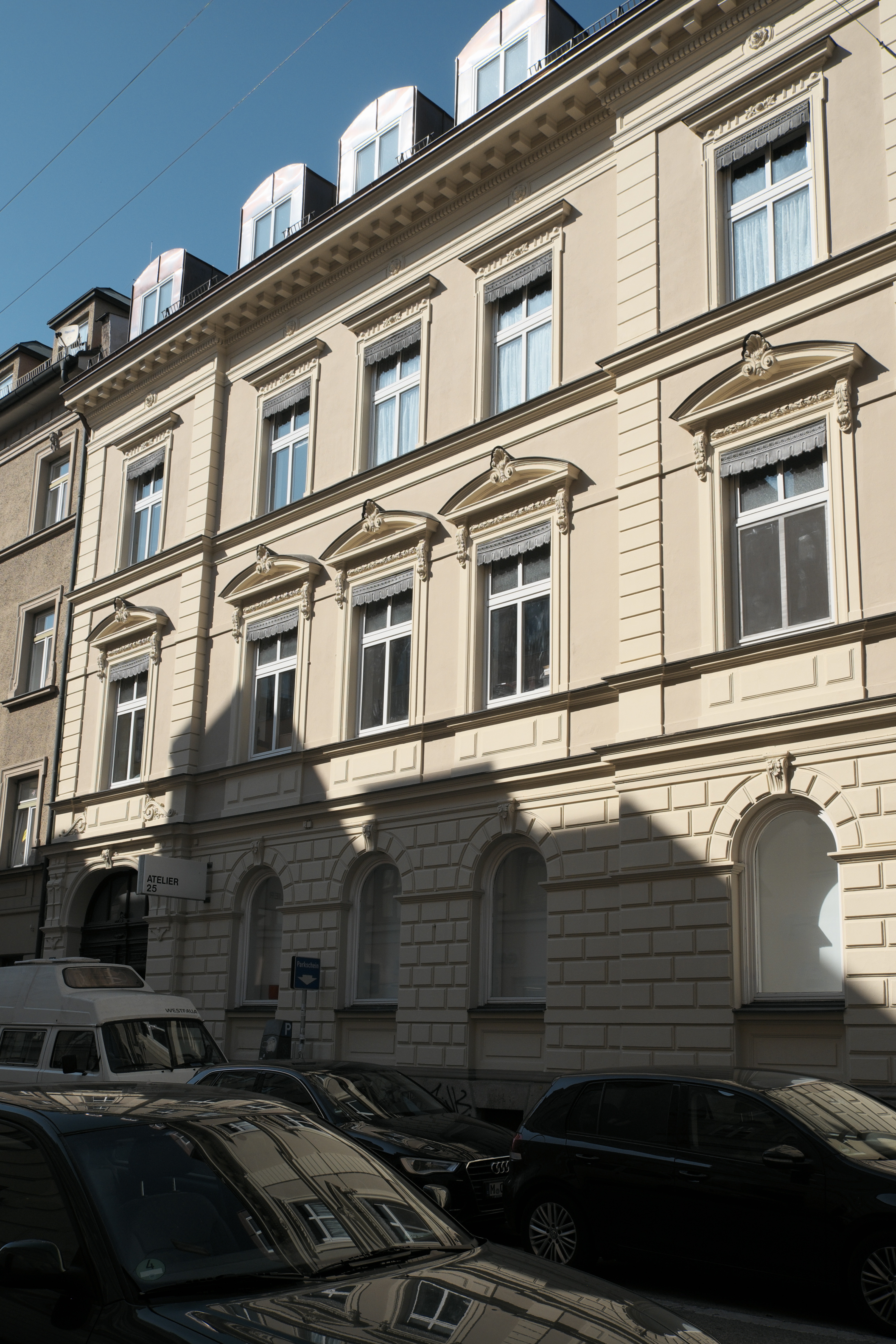 Mietshaus in der Schleißheimer Straße 25 im Stadtbezirk Maxvorstadt in München (Bayern/Deutschland), 1879/80 erbaut